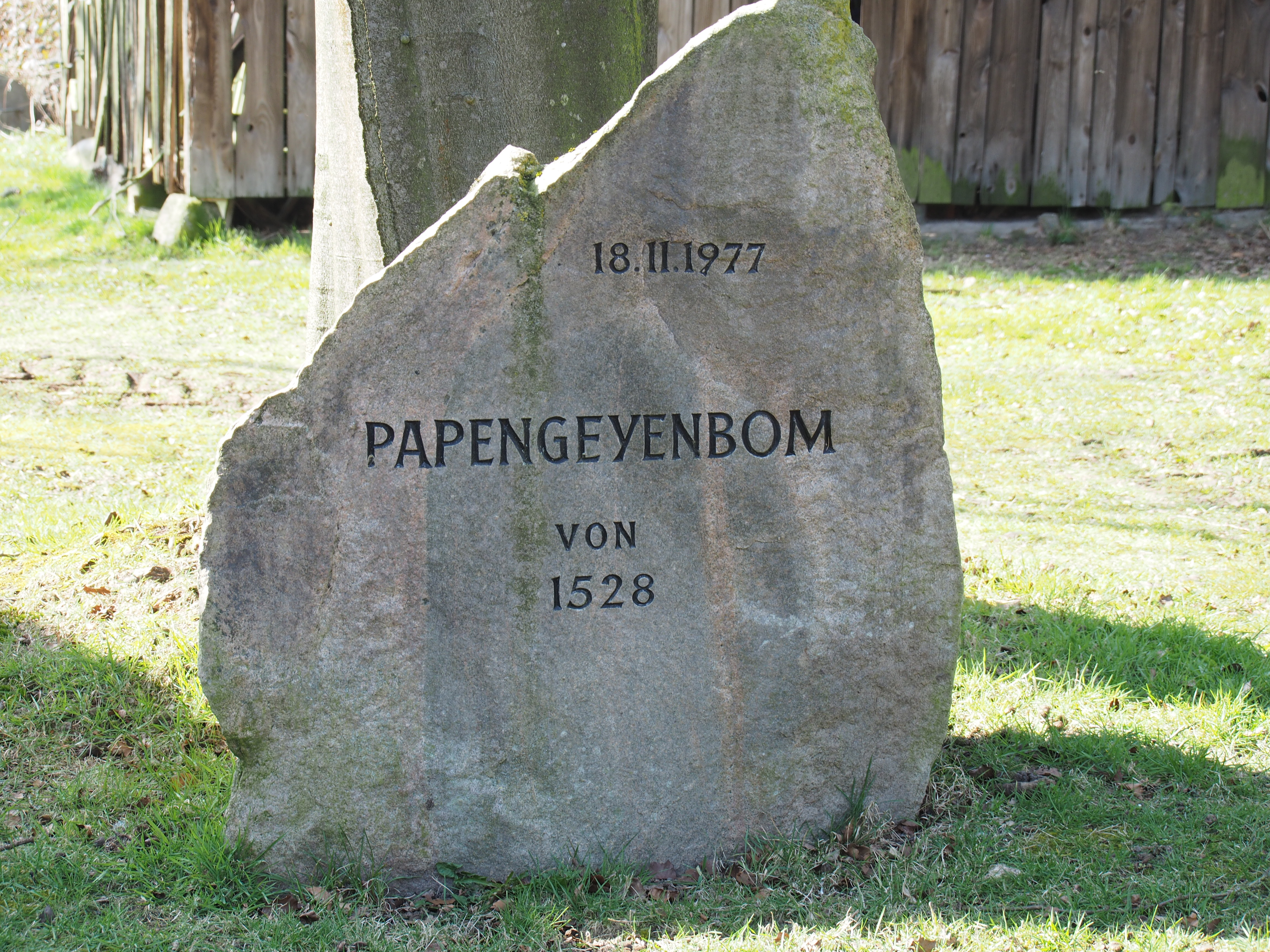 Der Stein erinnert an das Papageienschießen. Im Mittelalter wurde mit der Armbrust auf einen hölzernen Papageien oder Vogel geschossen, der sich auf einem "Papageienbaum" (plattdeutsch:Papengeyenbom) befand.